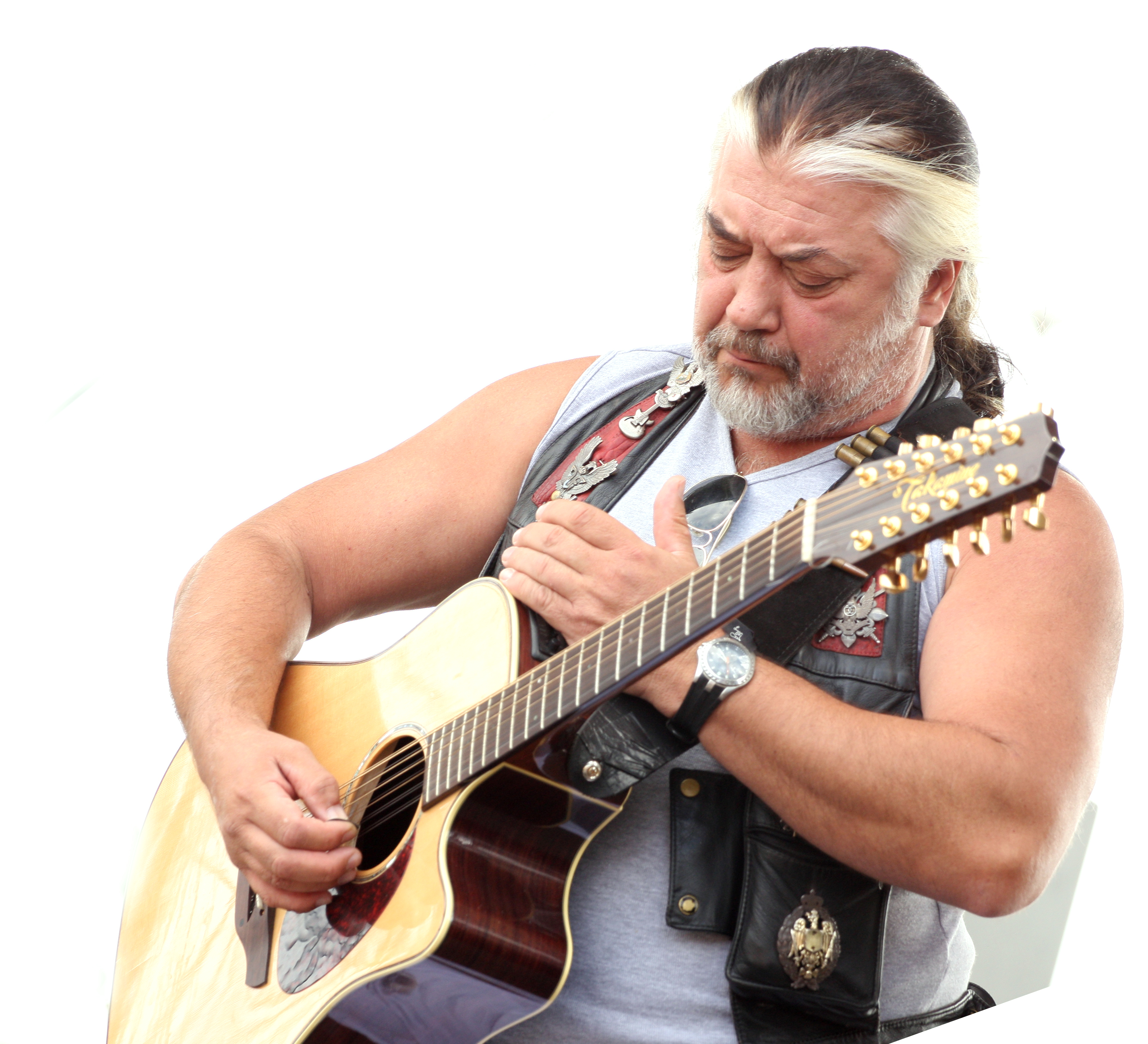 Nicu Covaci in concert la Targu Mures